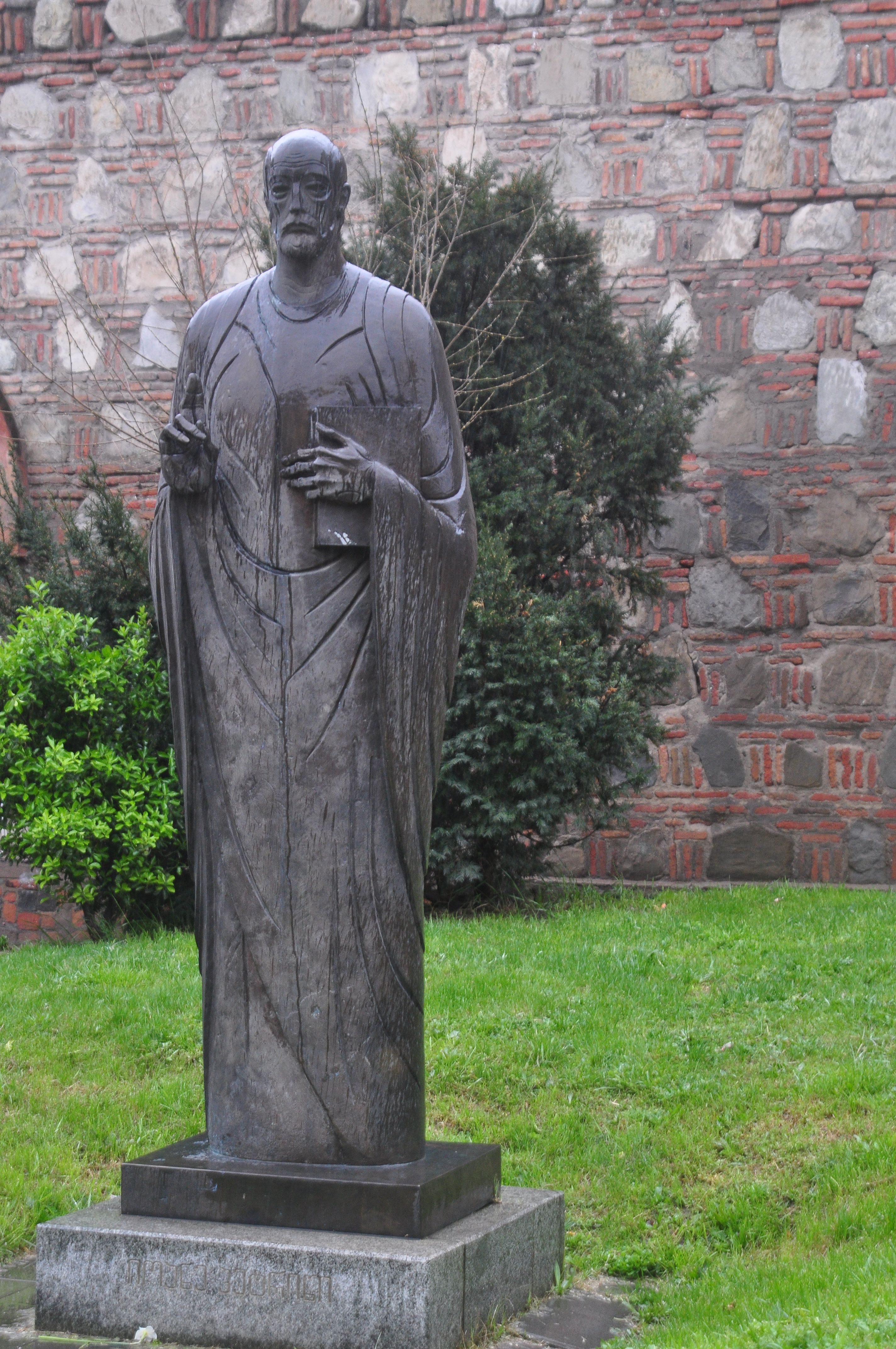 იოანე პეტრიწი